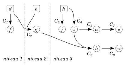 Exemple de graphe d'implication pour le problème SAT